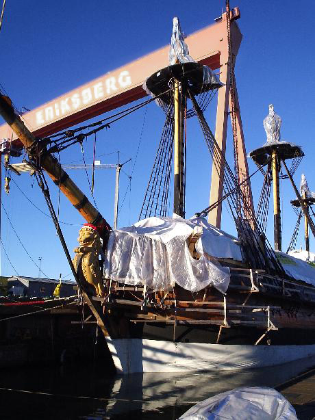 Ostindiefararen Götheborg, den 19 december 2004.